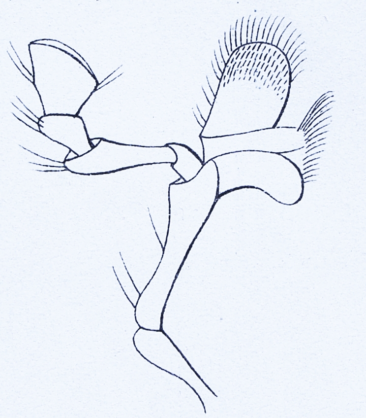 Poecilonota rutilans Fabr. = Lamprodila rutilans (Fabricius, 1777)